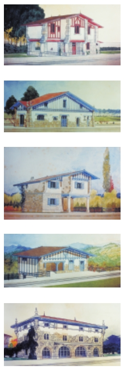 Urola eskualdeko trenbide geltokiak, neoeuskotar eta neoerregionalista estiloetan